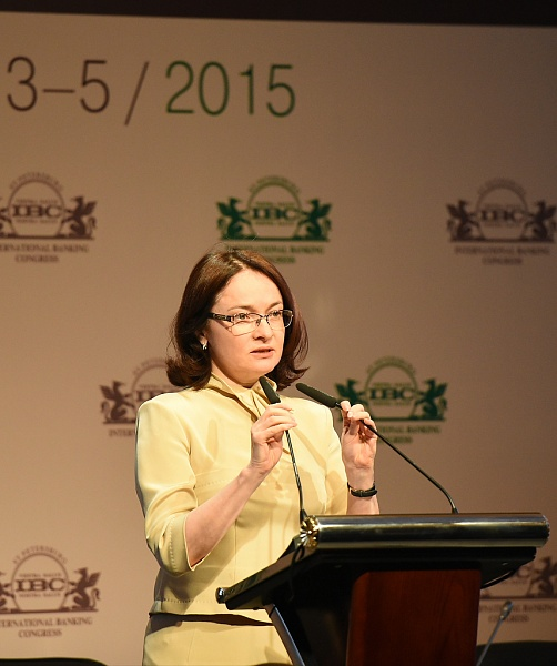 МБК-2015